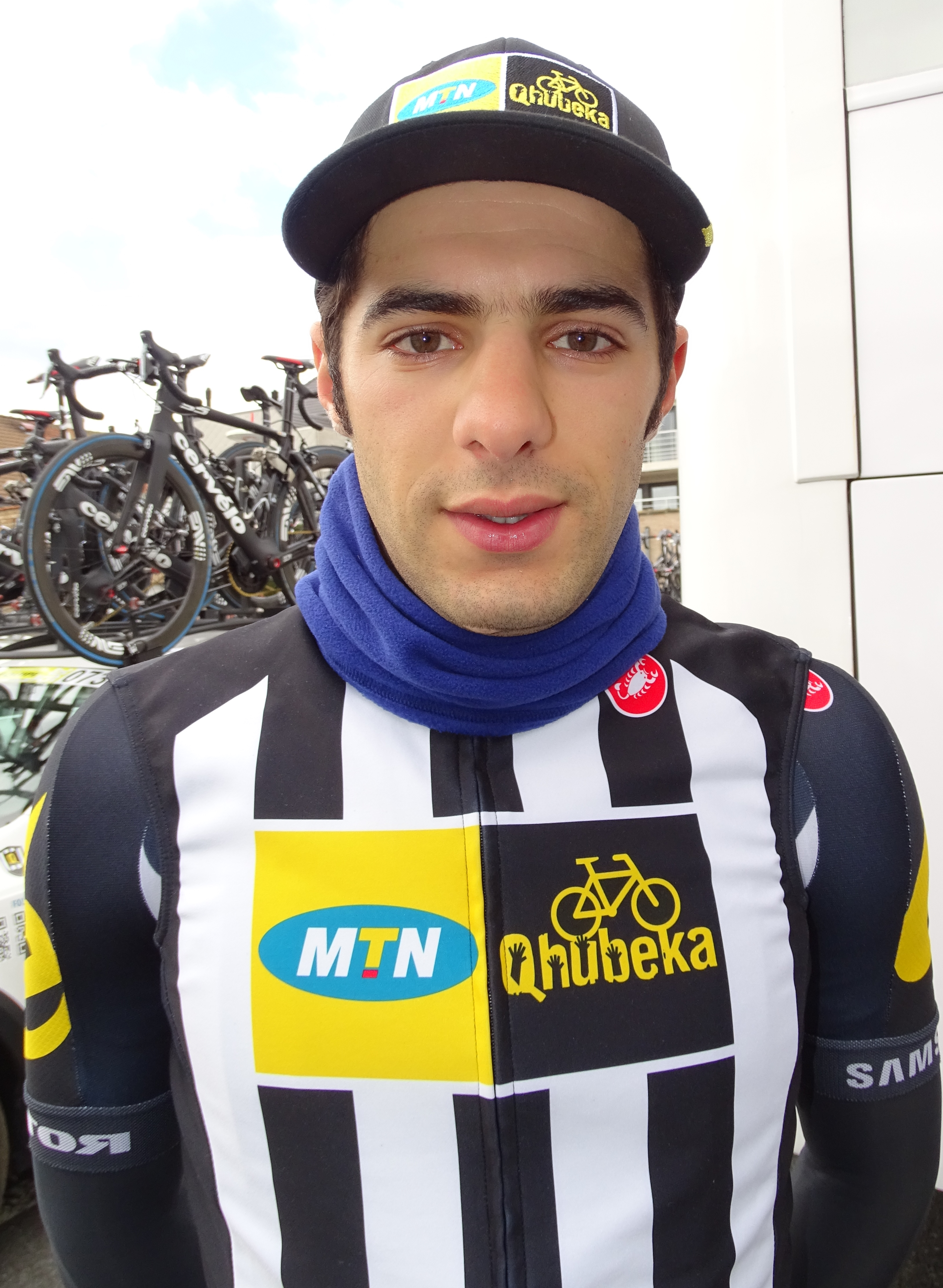 Reportage réalisé le mardi 31 mars à l'occasion de du départ de la première étape des Trois jours de La Panne 2015 à La Panne, Belgique.